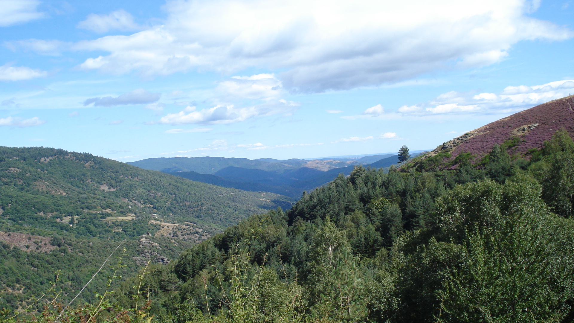 La vallée de St Martin vue depuis le Plan de Fontmort à Saint-Martin-de-Lansuscle Lozère France